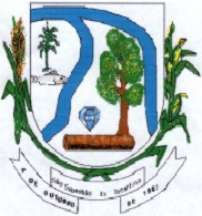 Timbre do Municipio de São Sebastião do Tocantins (Brazil)